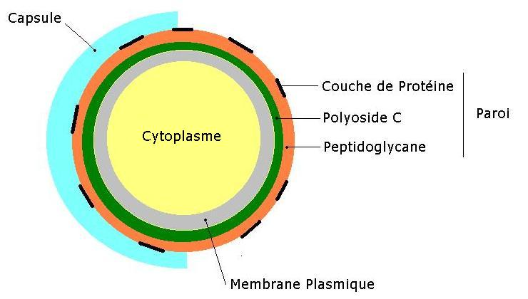 cree par alpha.prim le 17/08/2006